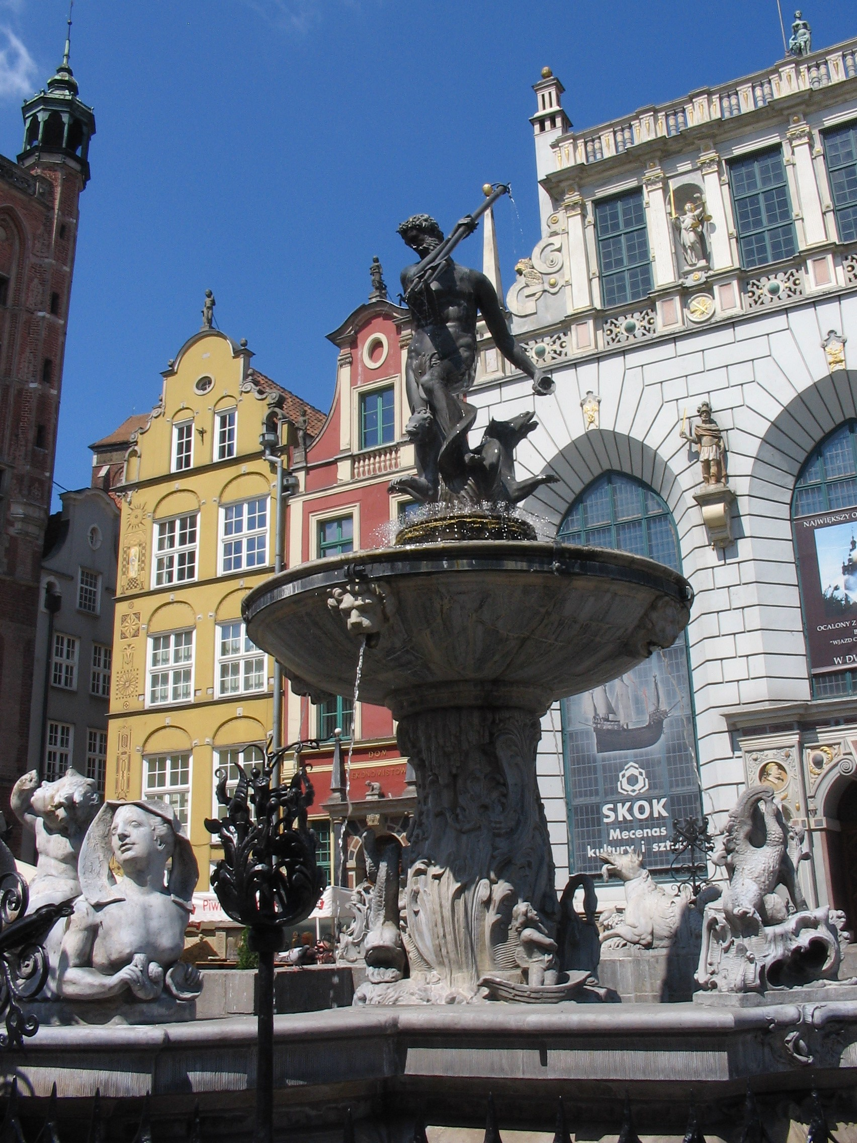 Fontanna Neptuna w Gdańsku